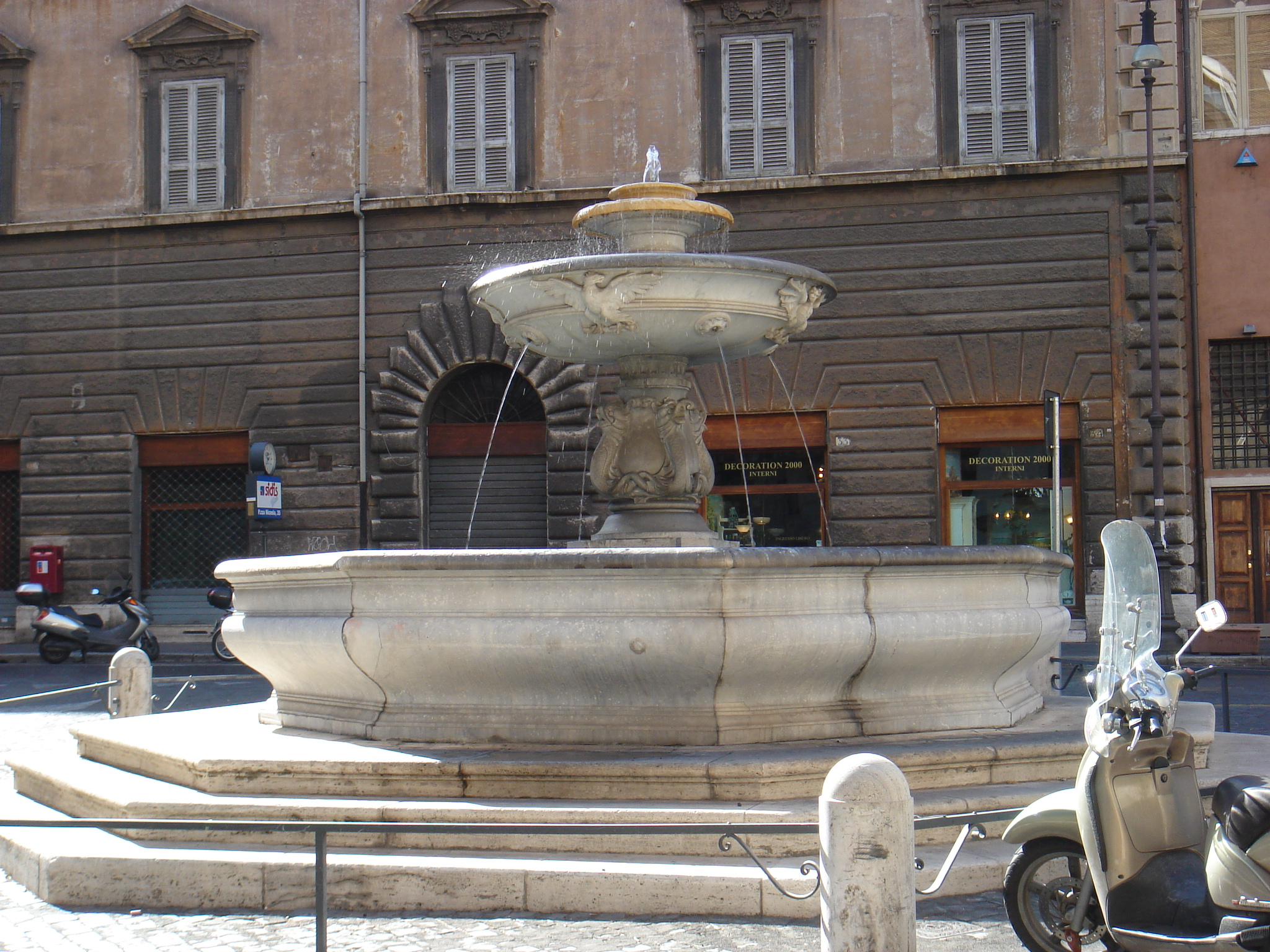 Roma, piazza Nicosia: fontana detta "del trullo", di Giacomo della Porta, posta dal 1572 al 1823 in piazza del Popolo, eliminata dal Valadier, risistemata dal 1950 in piazza Nicosia.